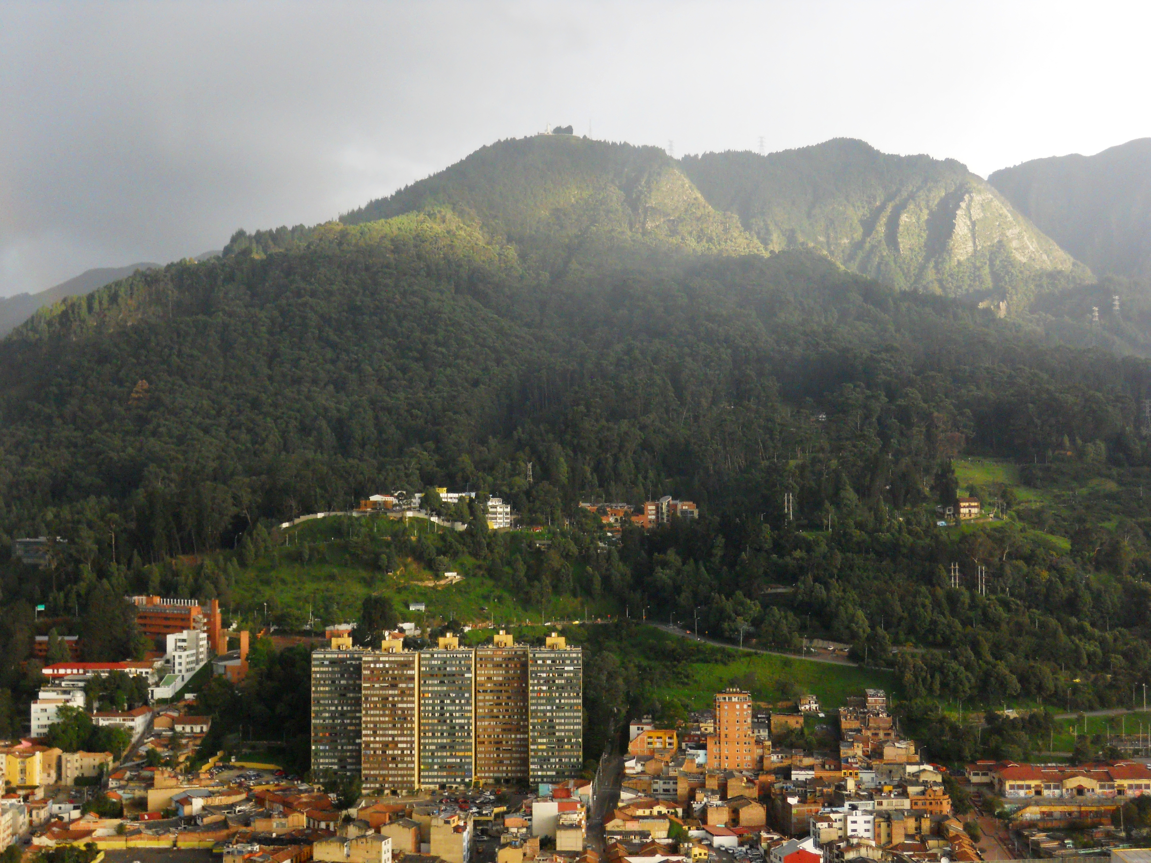 Cerro de Guadalupe en Bogotá. parte alta del barrio La Concorida, en la localidad de La Candelaria.